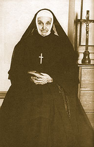 Mère Marie-Anne Blondin en 1888, au seuil de ses 80 ans